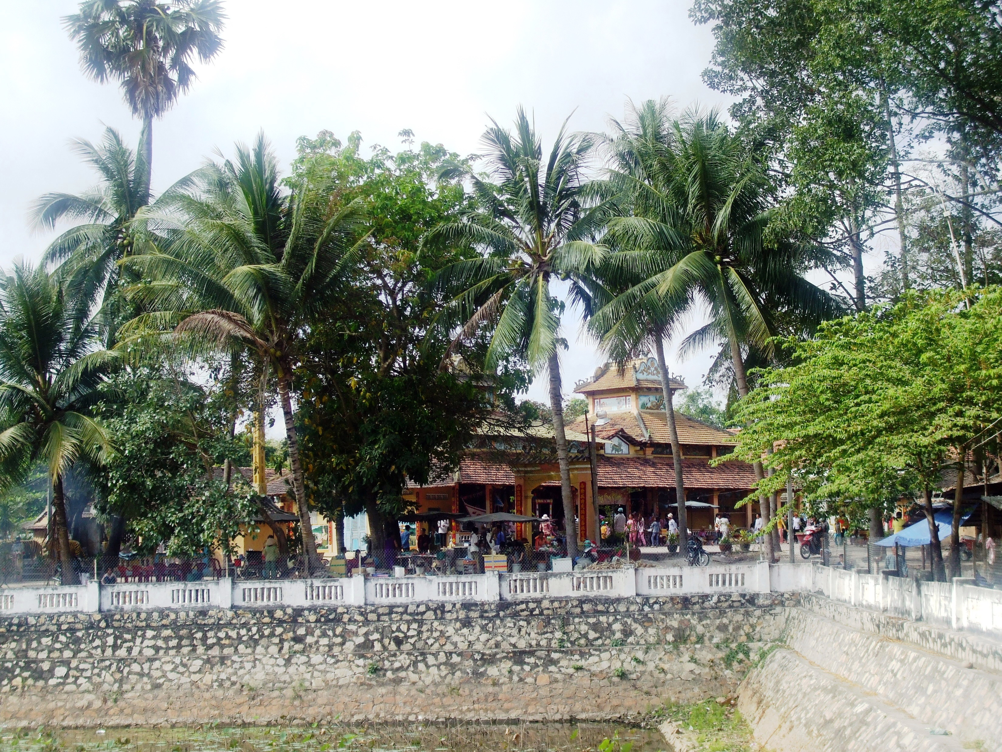 Đình Thới Sơn tọa lạc gần chân núi Két, thuộc xã Thới Sơn, huyện Tịnh Biên, tỉnh An Giang. Đây là một ngôi đình thờ thần Thành hoàng của làng Xuân Sơn và Hưng Thới xưa (sau ghép lại là Thới Sơn), và là một di tích lịch sử cách mạng Việt Nam.